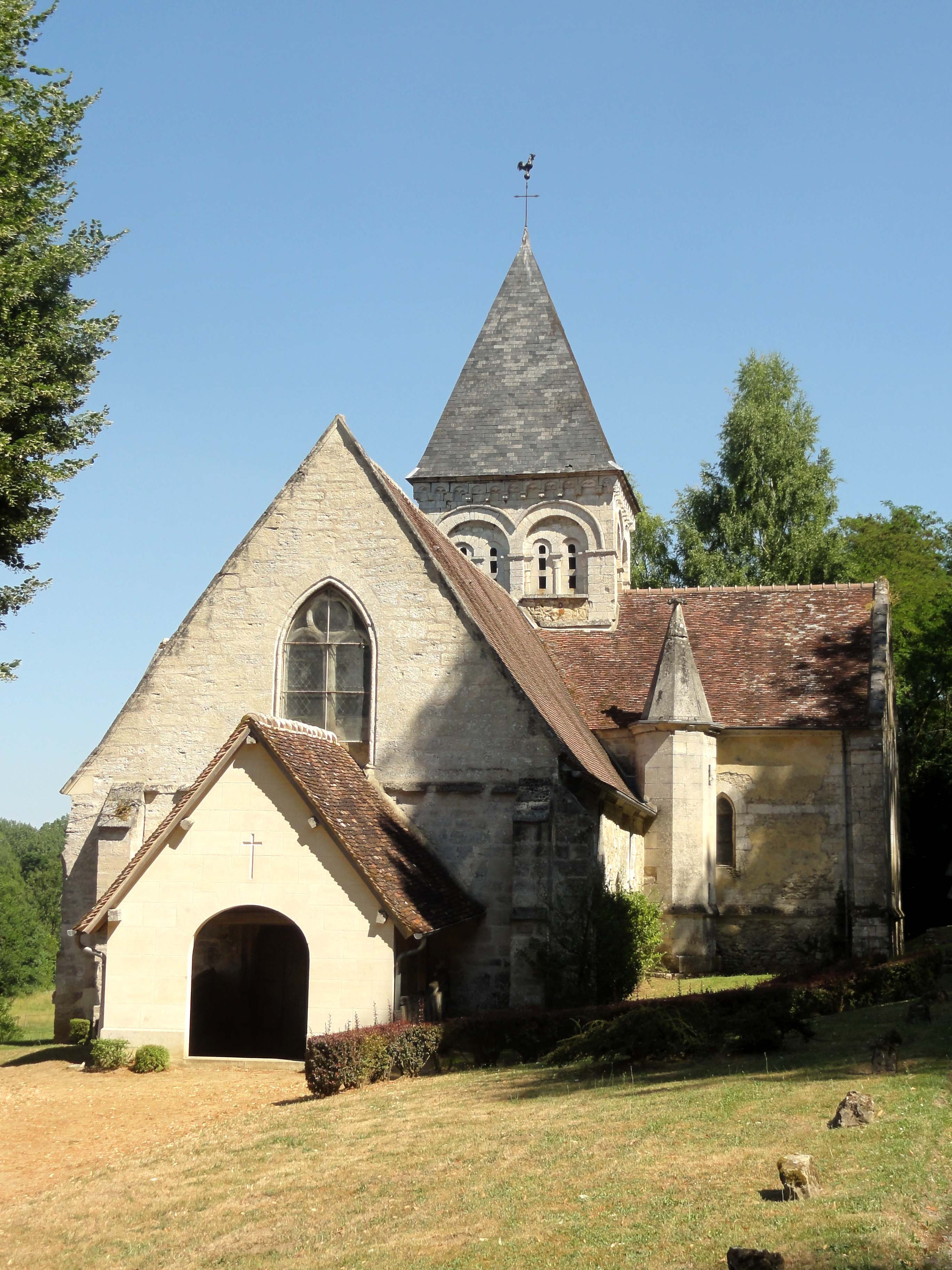 Façade occidentale.